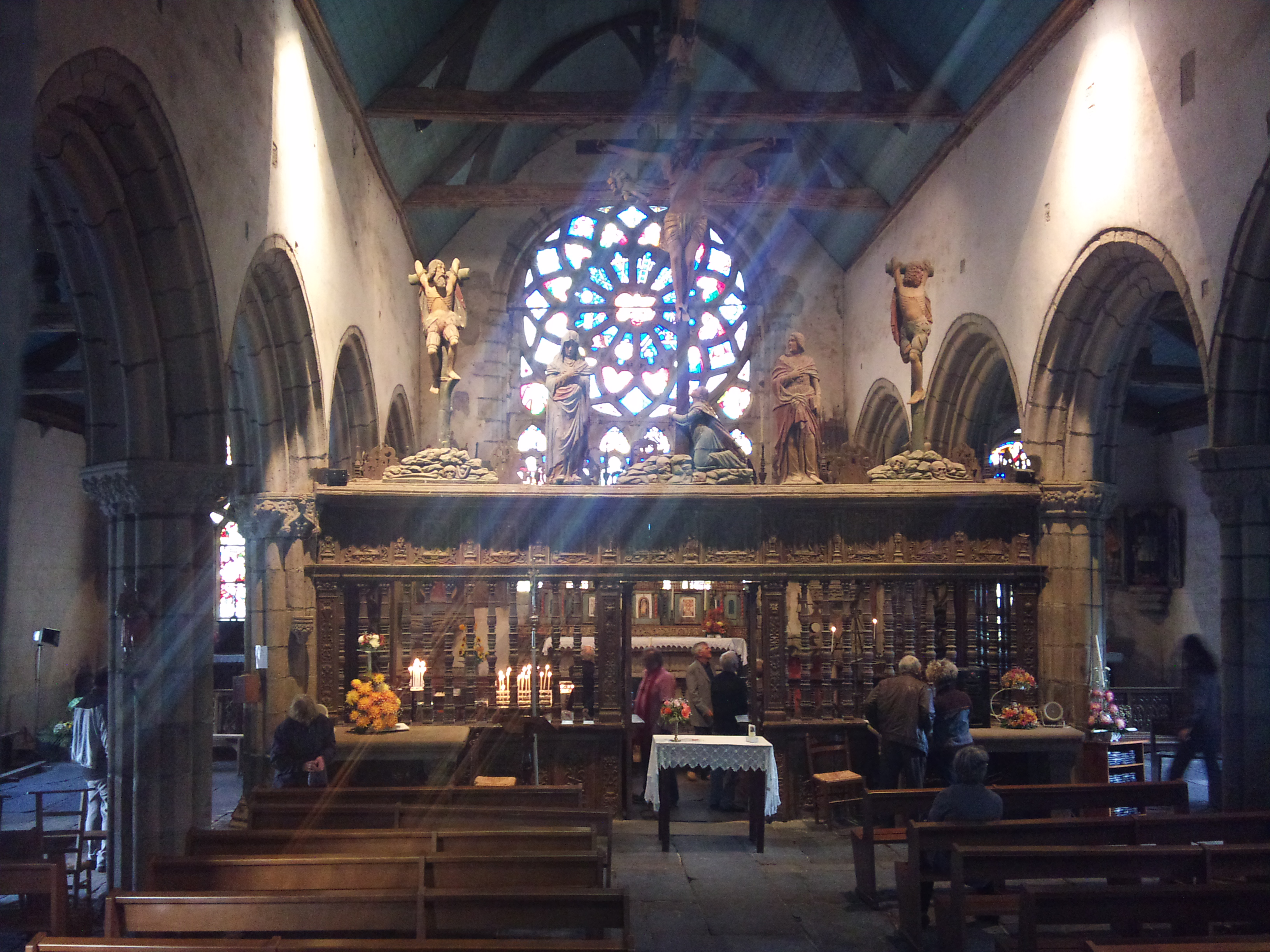 Jubé ou chancel du XVIe siècle de la chapelle Saint-Herbot (Plonévez-du-Faou)